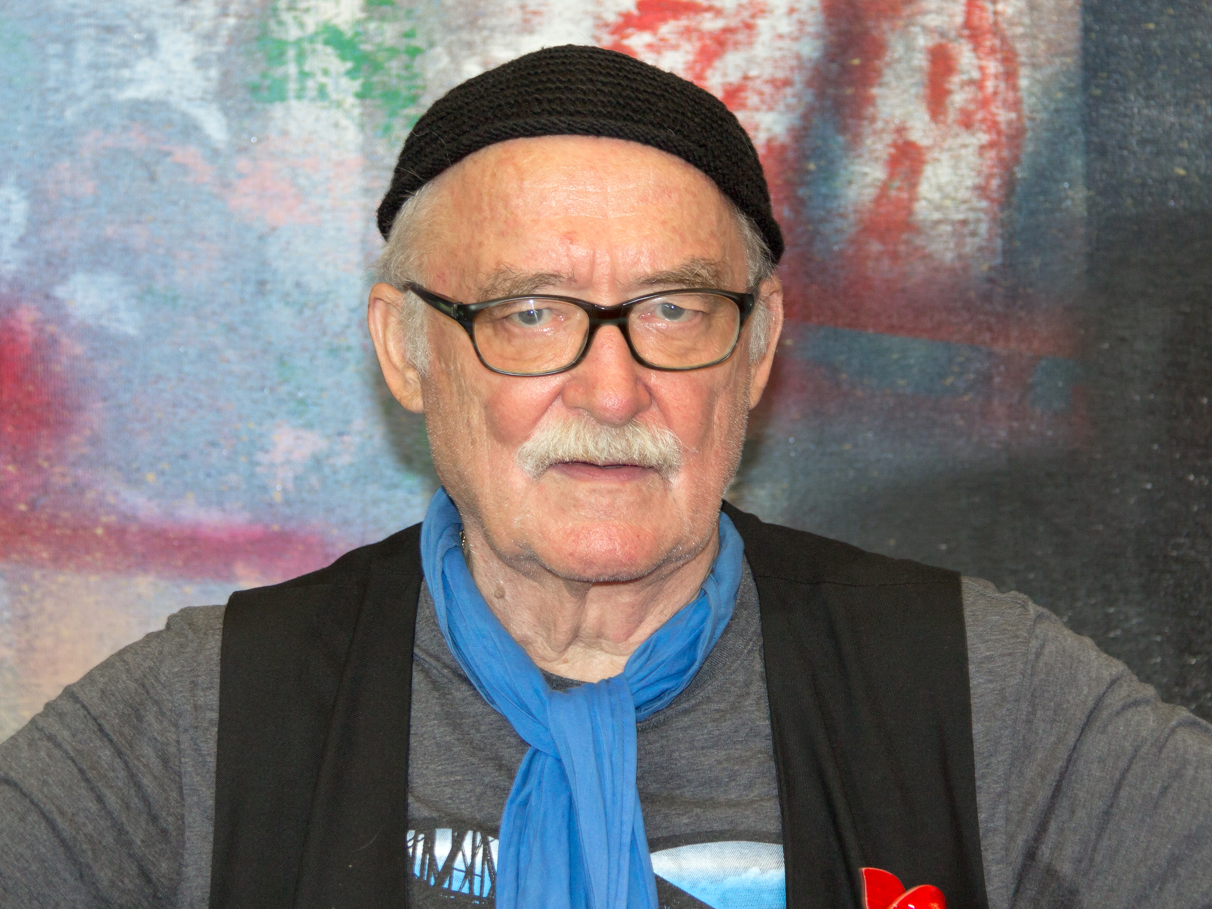 Pressetermin 30 Jahre Lindenstraße - Hans W. Geißendörfer